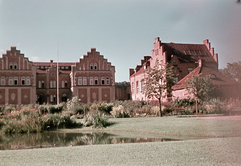 Folkskola. Lyckhemsgatan Motiv: Jönköping Nyckelord: Riksintressen Kategori: Stadsmiljö, Skola Folkskola. Lyckhemsgatan.